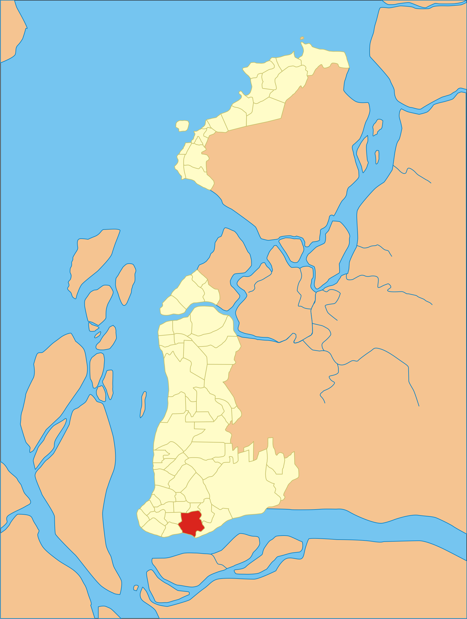 Localização do bairro em Belém do Pará